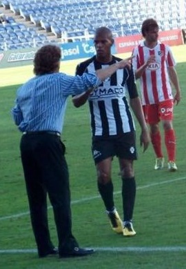 Kanú junto con Carreño en partido de Wanderers contra Atletico de Madrid en un partido por el Trofeo Colombino.